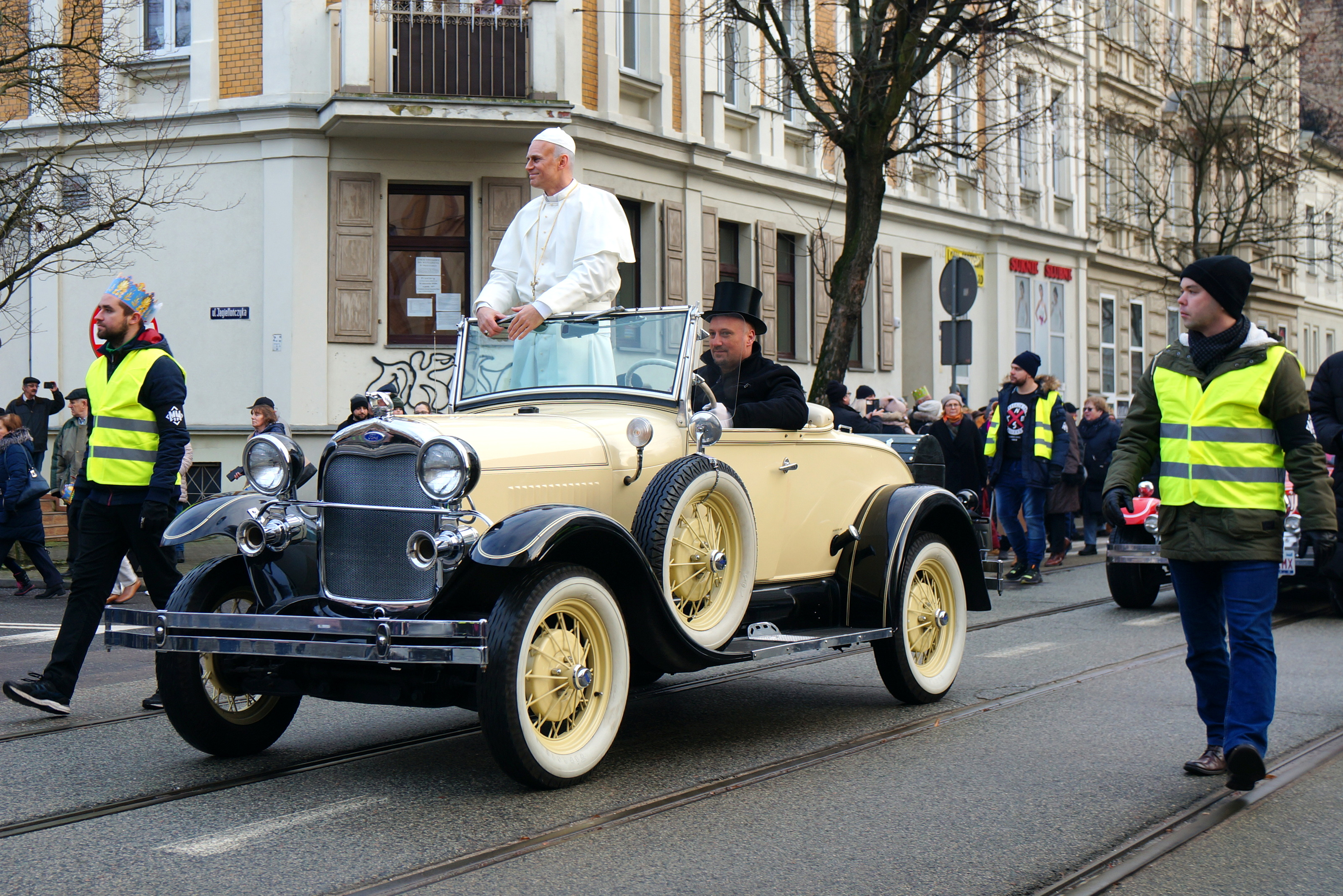 VI Orszak Trzech Króli w Gorzowie Wlkp. w 2020 r. Oprócz królów, Kacpra, Melchiora i Baltazara, w orszaku znalazły się postaci z historii Polski, w tym postać papieża Jana Pawła II. Służbę porządkową pełnili mężczyźni z opaskami Młodzieży Wszechpolskiej na ramieniu.